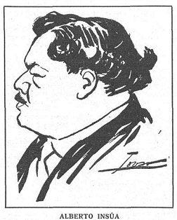 Alberto Insúa.